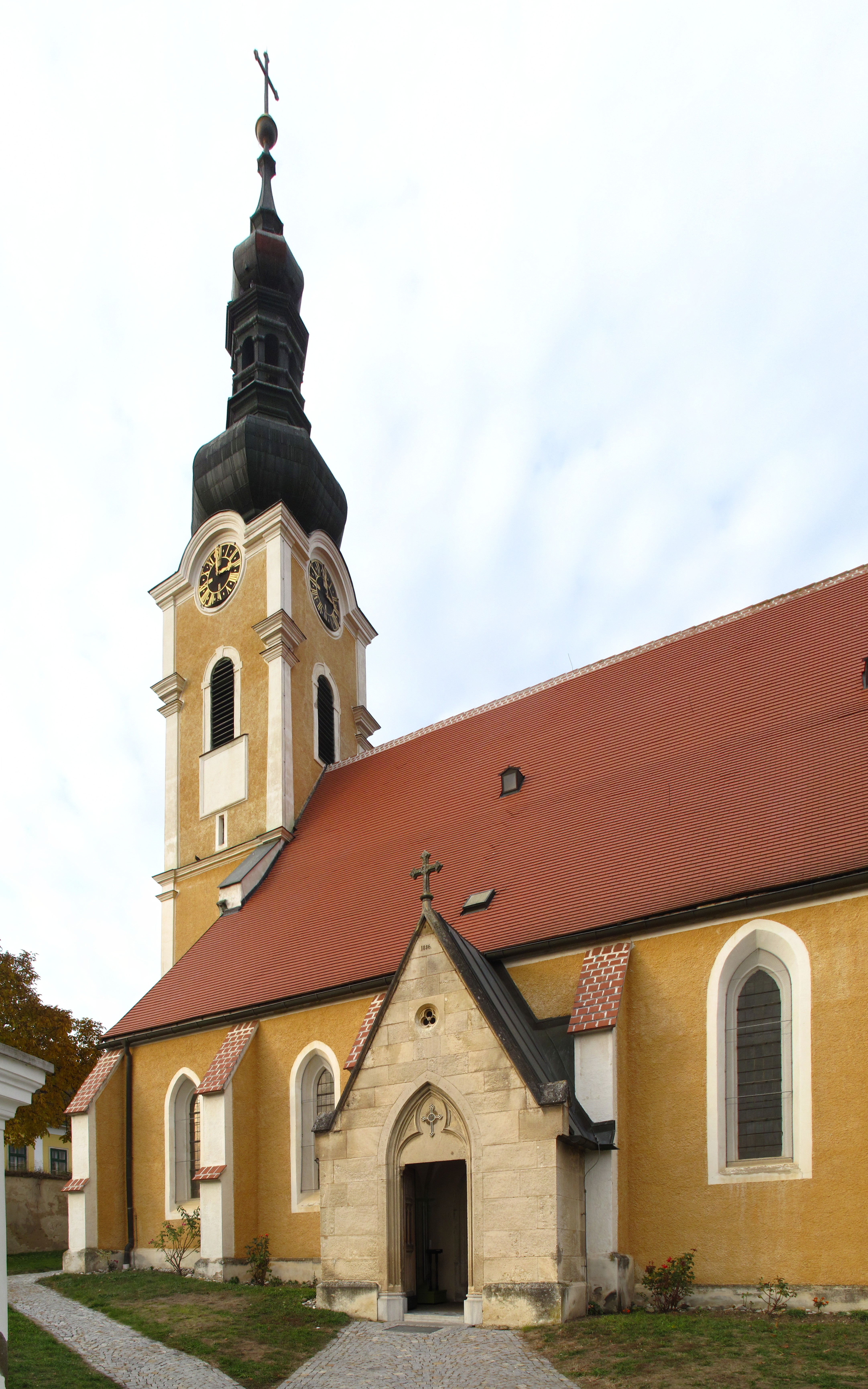 Kath. Pfarrkirche Mariae Geburt und ehem. Wehrkirchhof, 3550 Gobelsburg, Gobelsburger Hauptstraße